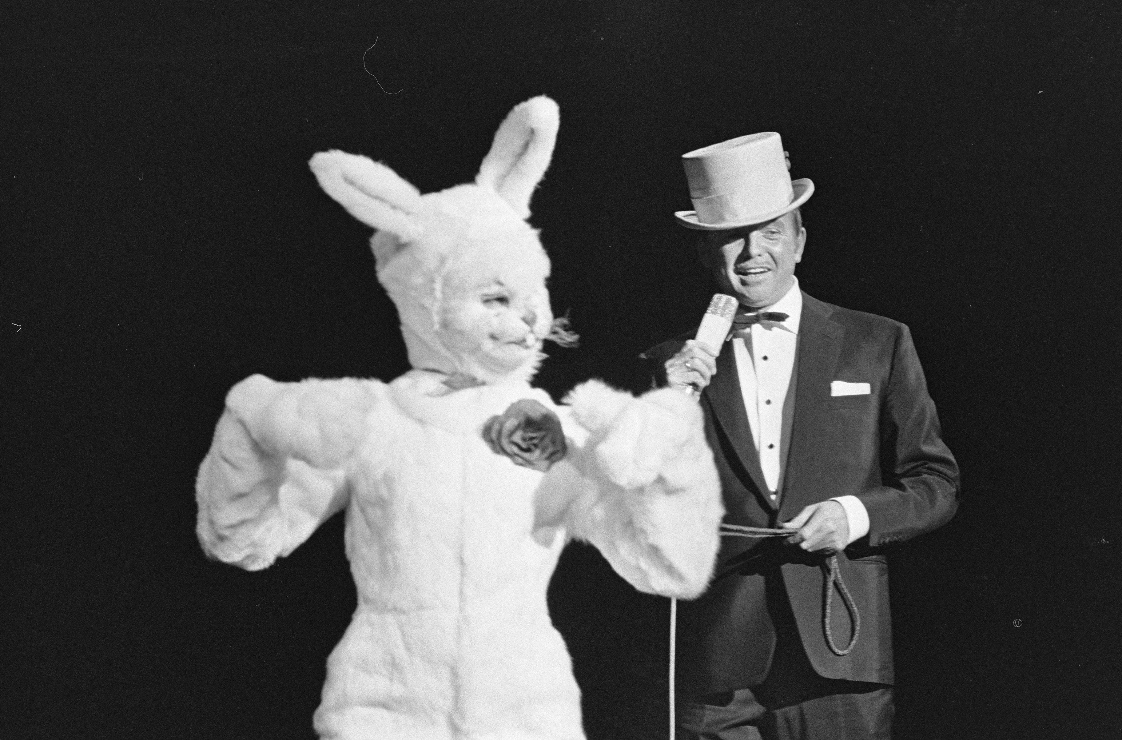 Collectie / Archief : Fotocollectie Anefo Reportage / Serie : [ onbekend ] Beschrijving : Premiere van Toon Hermans tiende One man show te Tilburg Datum : 21 februari 1966 Locatie : Noord-Brabant, Tilburg Trefwoorden : PREMIERES, shows Persoonsnaam : Hermans, Toon Fotograaf : Koch, Eric / Anefo Auteursrechthebbende : Nationaal Archief Materiaalsoort : Negatief (zwart/wit) Nummer archiefinventaris : bekijk toegang 2.24.01.05 Bestanddeelnummer : 918-8168